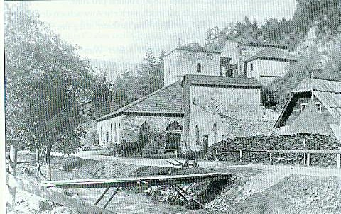 Schmelzofen, ehem. Schmelzofen "Alfred-Hütte" nach der Stilllegung 1895.